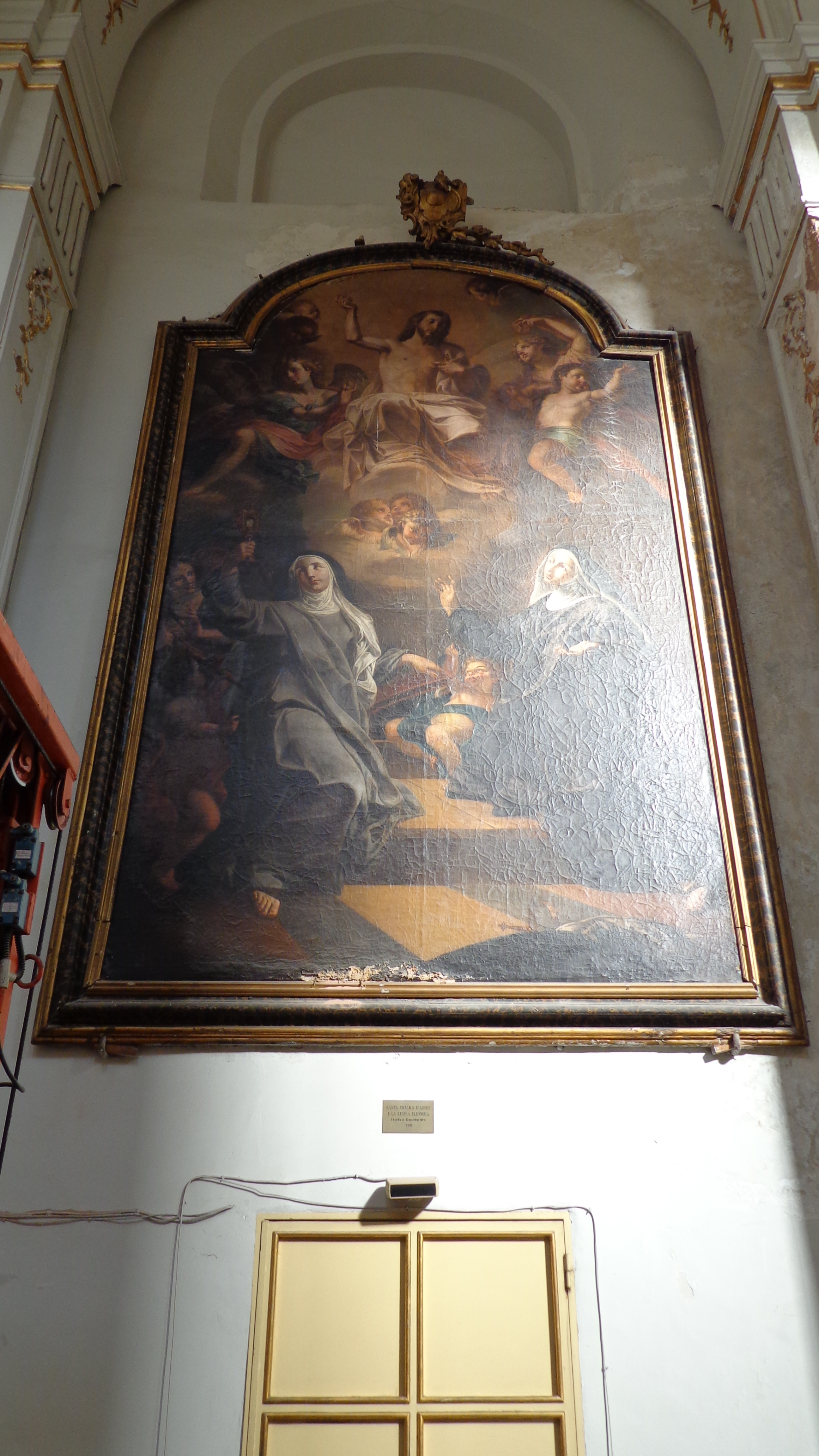 Altare